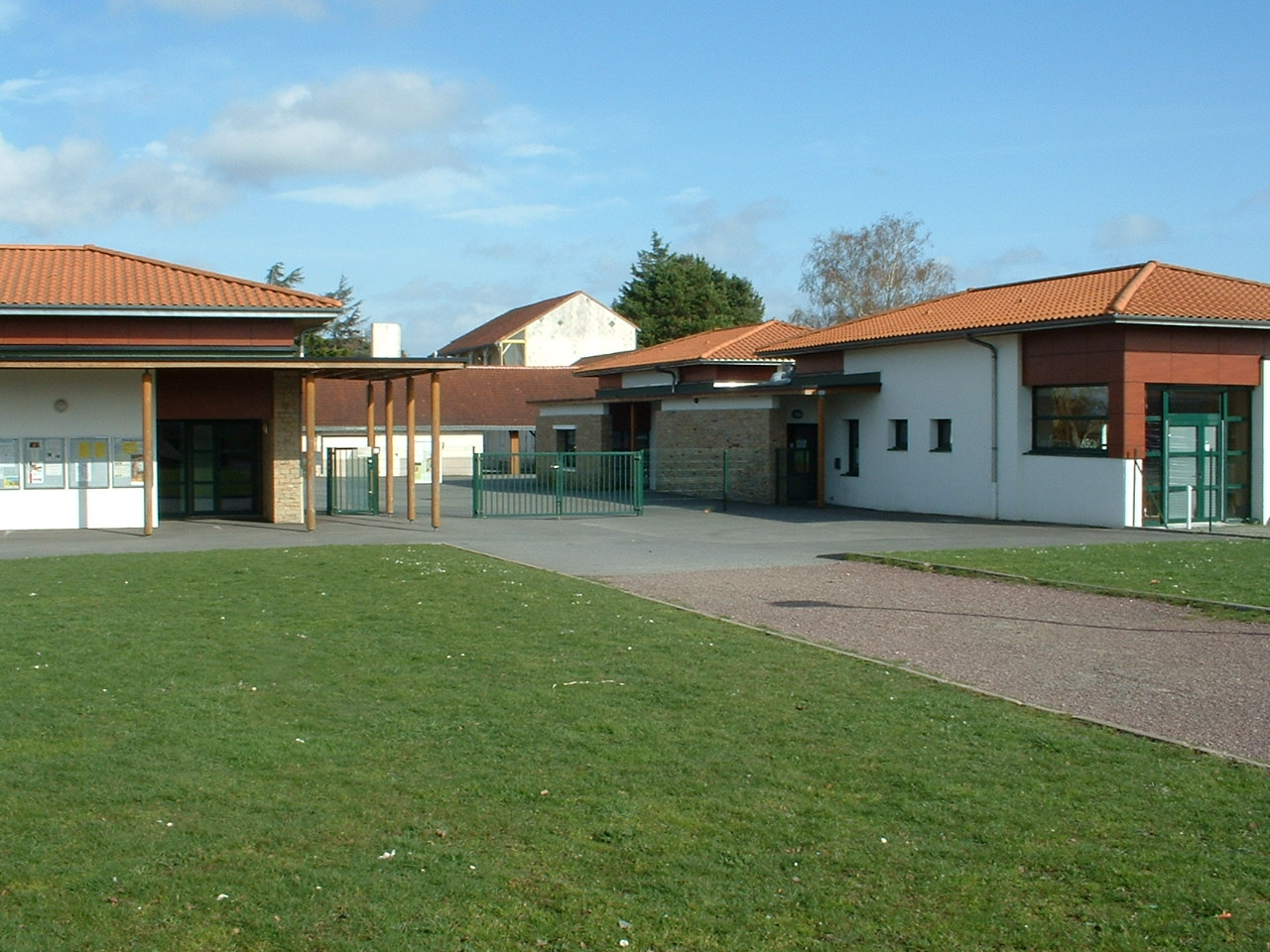 Rezé (France) - École primaire Ragon